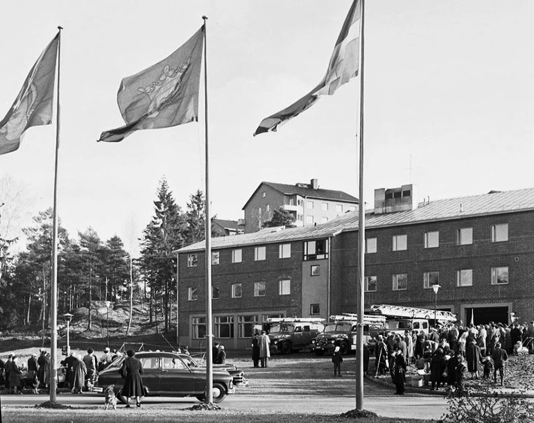 Invigningen av Enskede brandstation 1956 (senare Farsta Brandstation) Lingvägen 155.